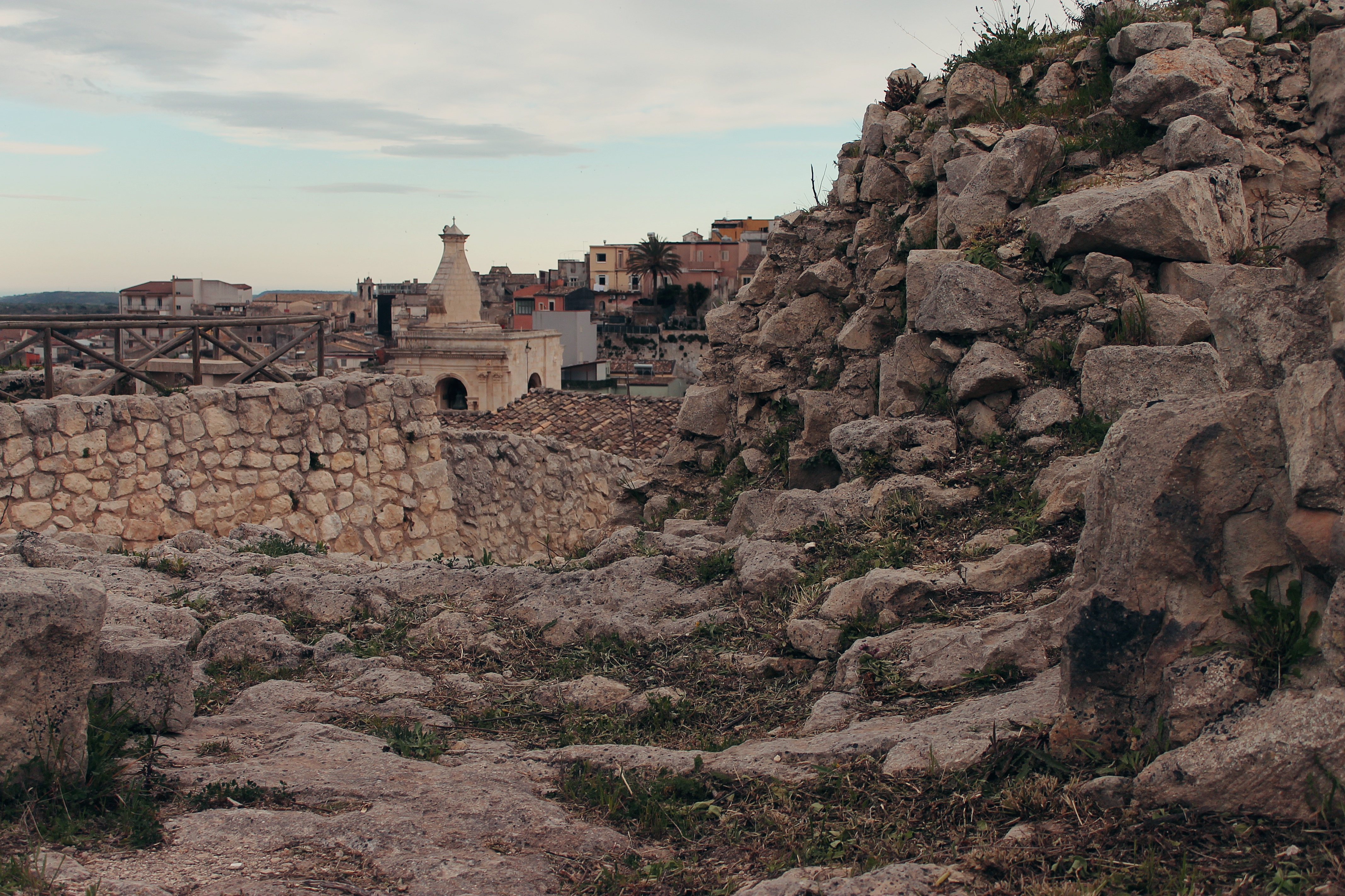 quartiere medievale di Palazzolo Acreide This is a photo of a monument which is part of cultural heritage of Italy.